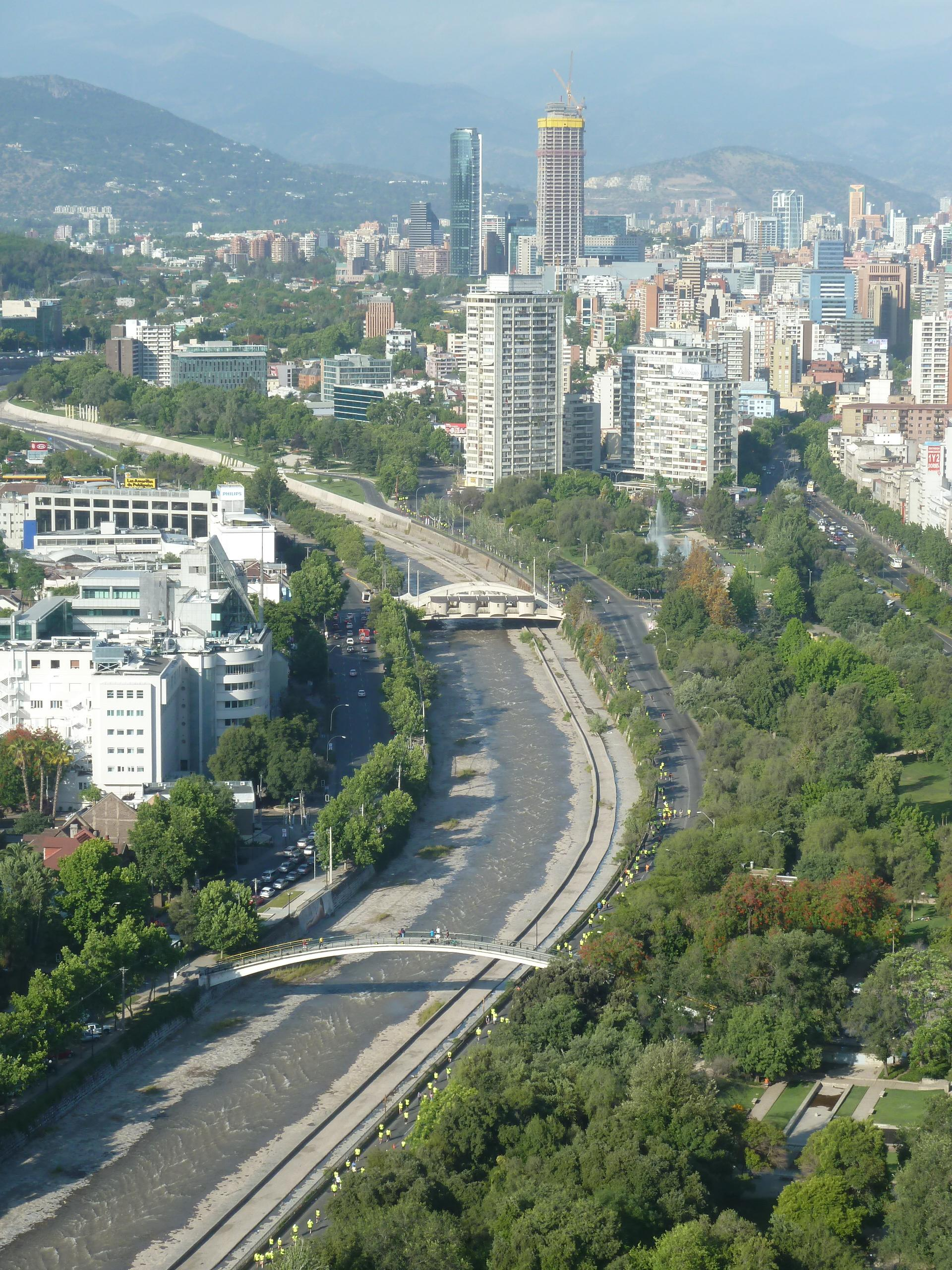 Desde la torre telefónica